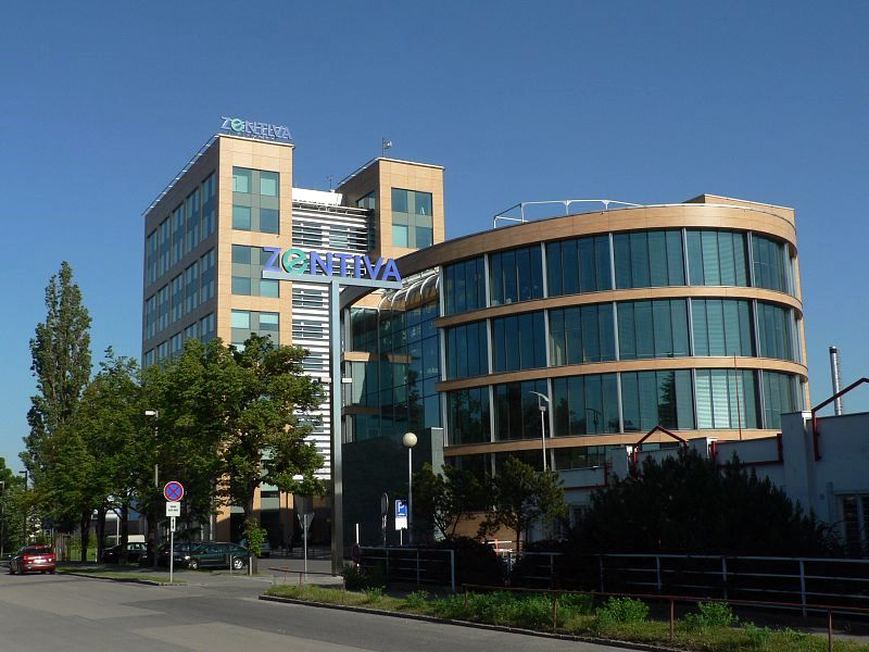 Zentiva Praha